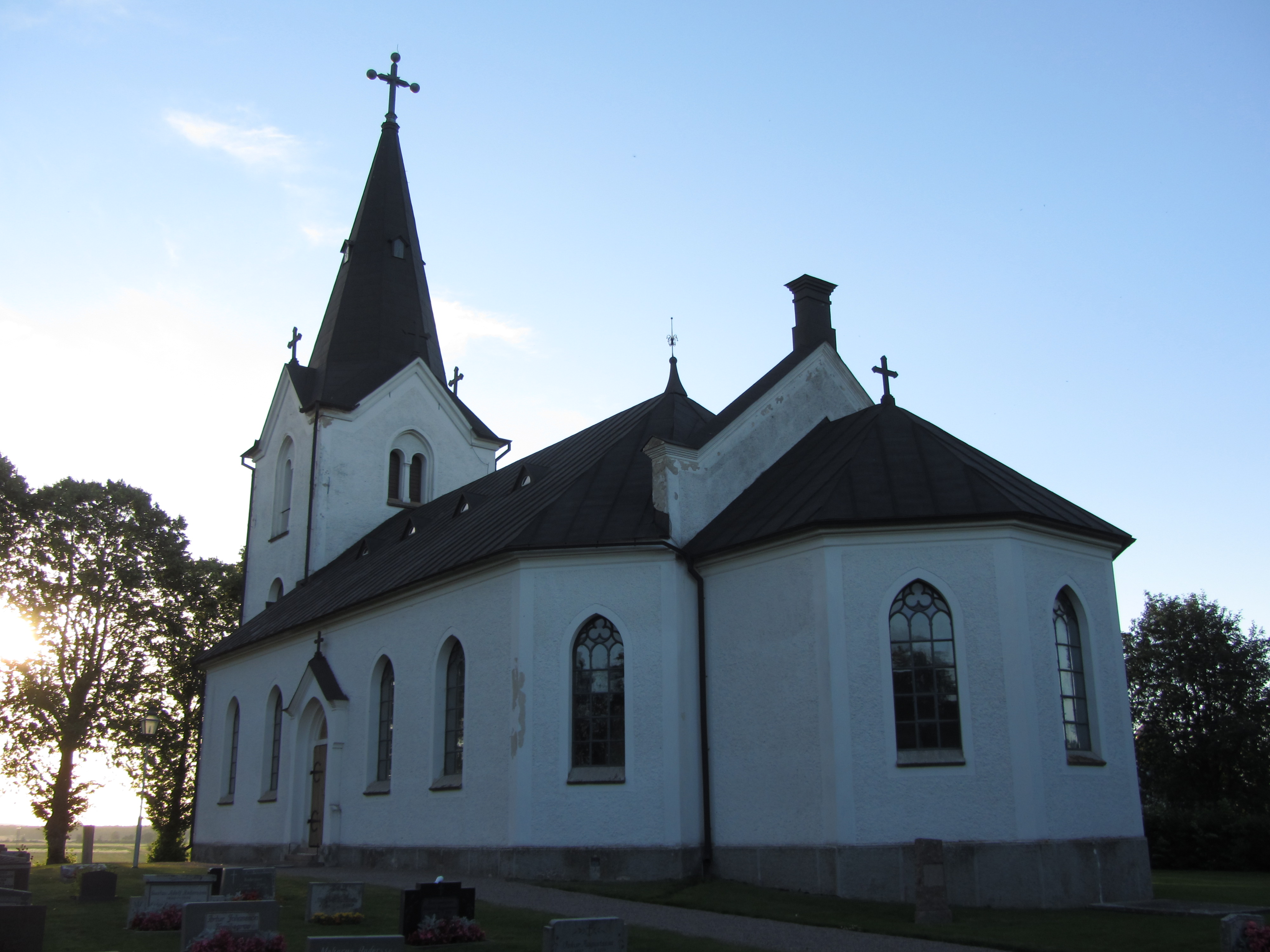 Ekby kyrka och kyrkogård i Vadsbo härad i Västergötland. Kyrkan ligger mellan Skövde och Mariestad.